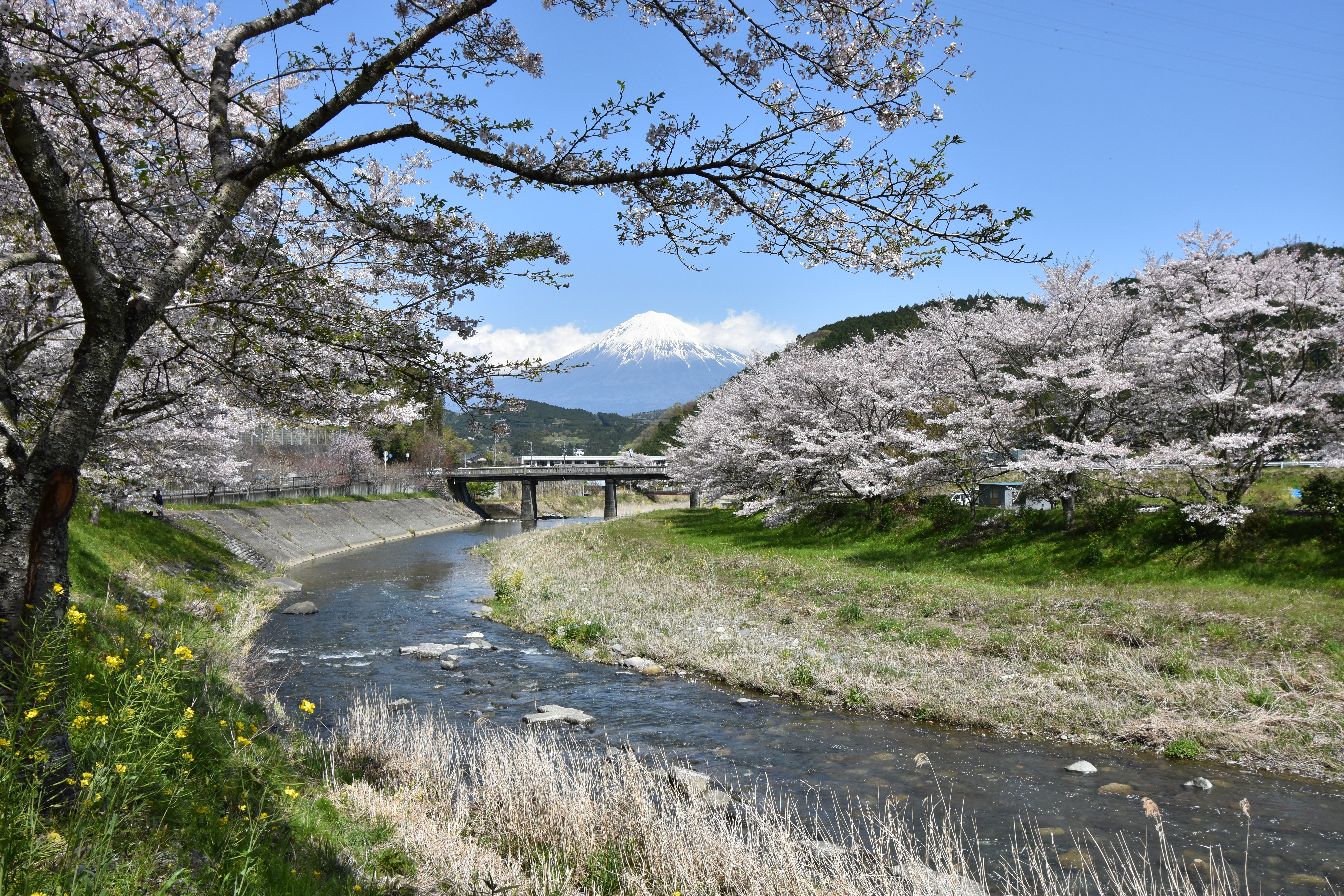 稲瀬川と富士山（富士山がある風景100選選定地）